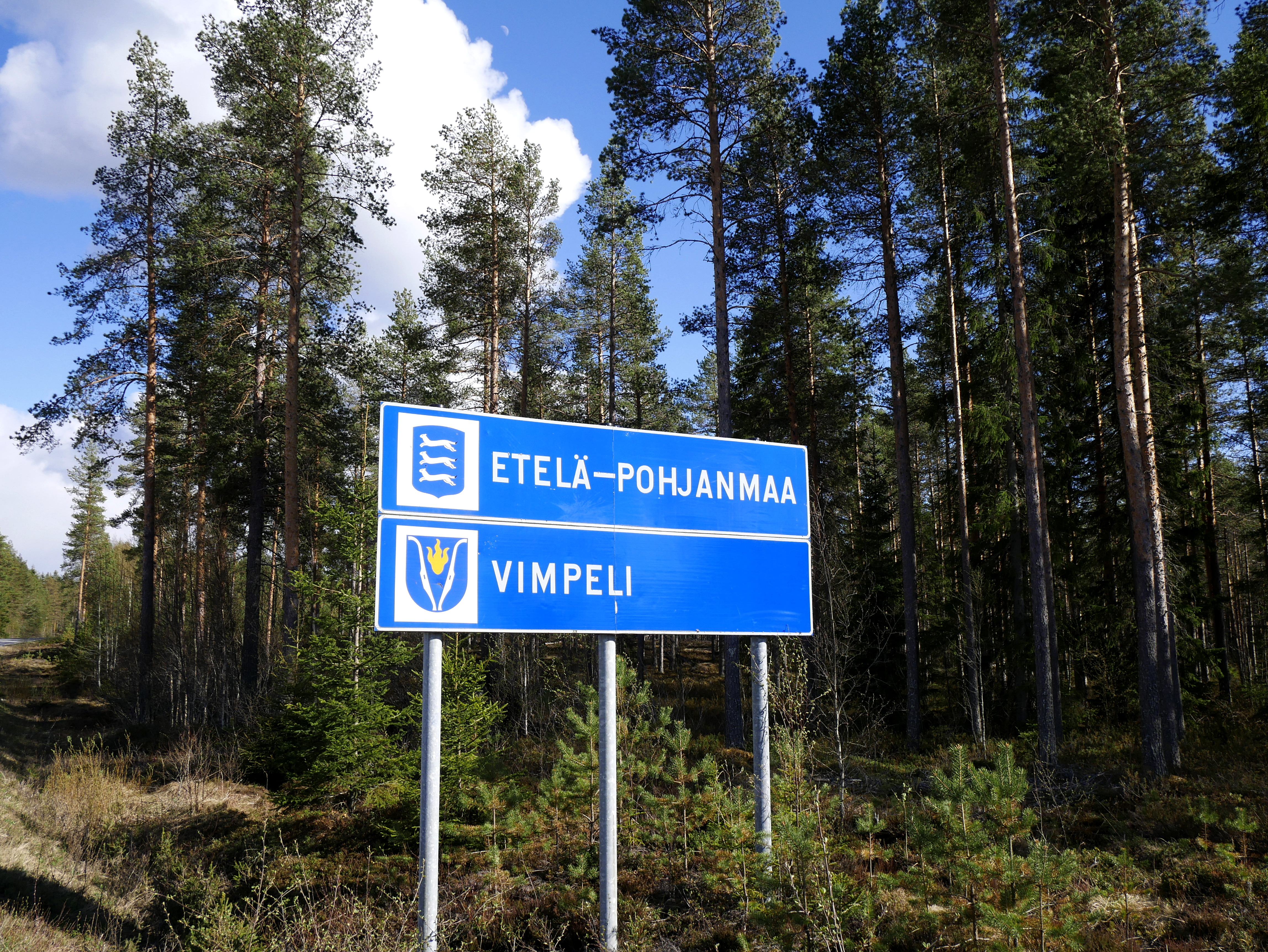 Etelä-Pohjanmaan maakunnan ja Vimpelin kunnan rajakyltti.